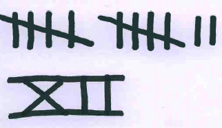 Tukkimiehen kirjanpidolla ja roomalaisilla numeroilla merkittynä luku 12 Template:FiTukkimiehen kirjanpidolla ja roomalaisilla numeroilla merkittynä luku 12